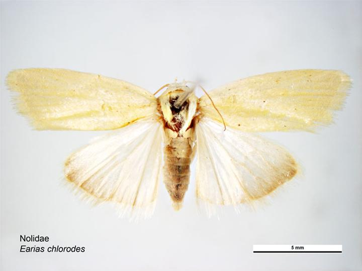 Earias chlorodes dorsal view